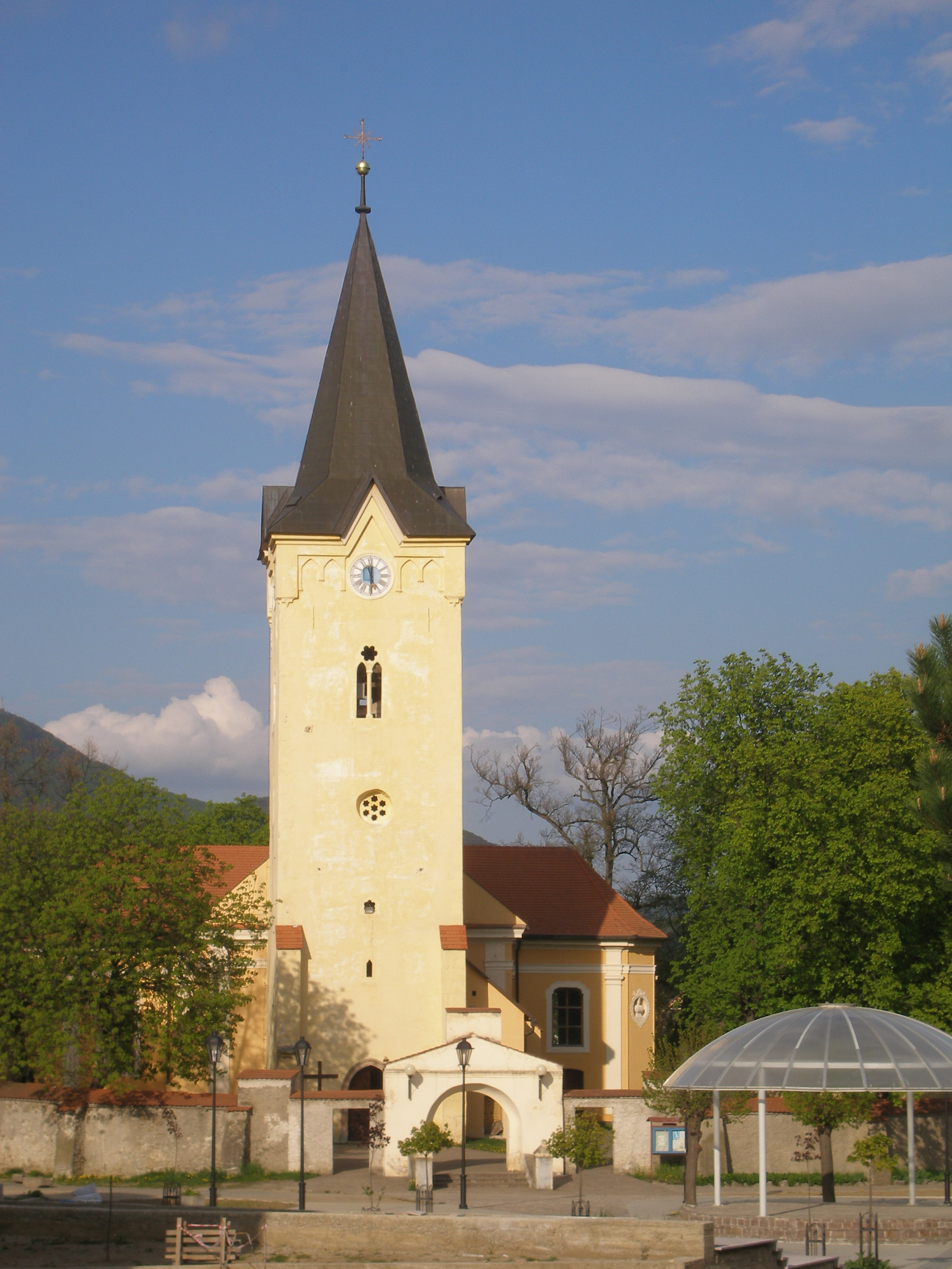 Mesto Veľký Šariš okres Prešov región Šariš